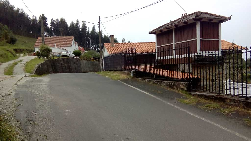 Vista de Castiñeira, Esmelle.